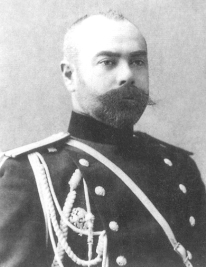 Полковник Антон Деникин в 1906 году